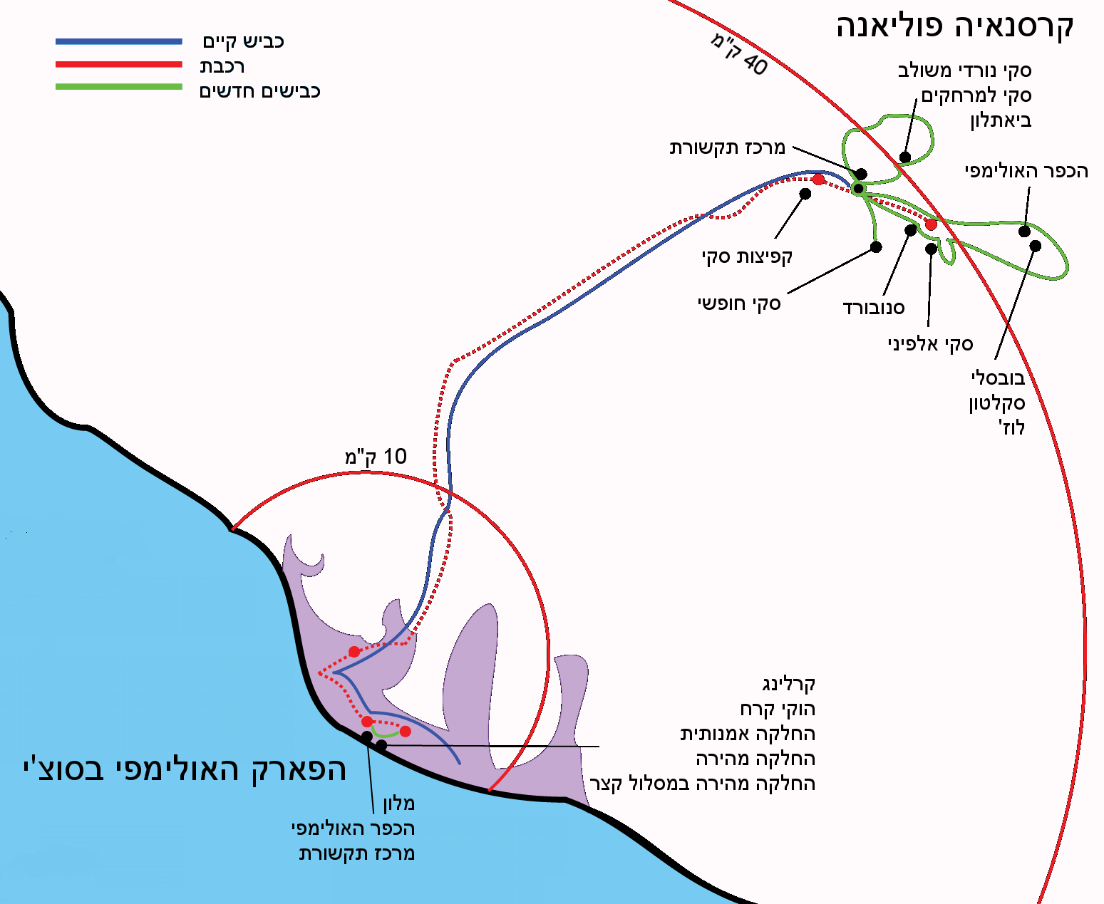 אולימפיאדת סוצ'י